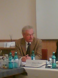 Prof. Dr. Martin Jänicke auf einer Pressekonferenz des Forums ökologisch-soziale Martwirtschaft